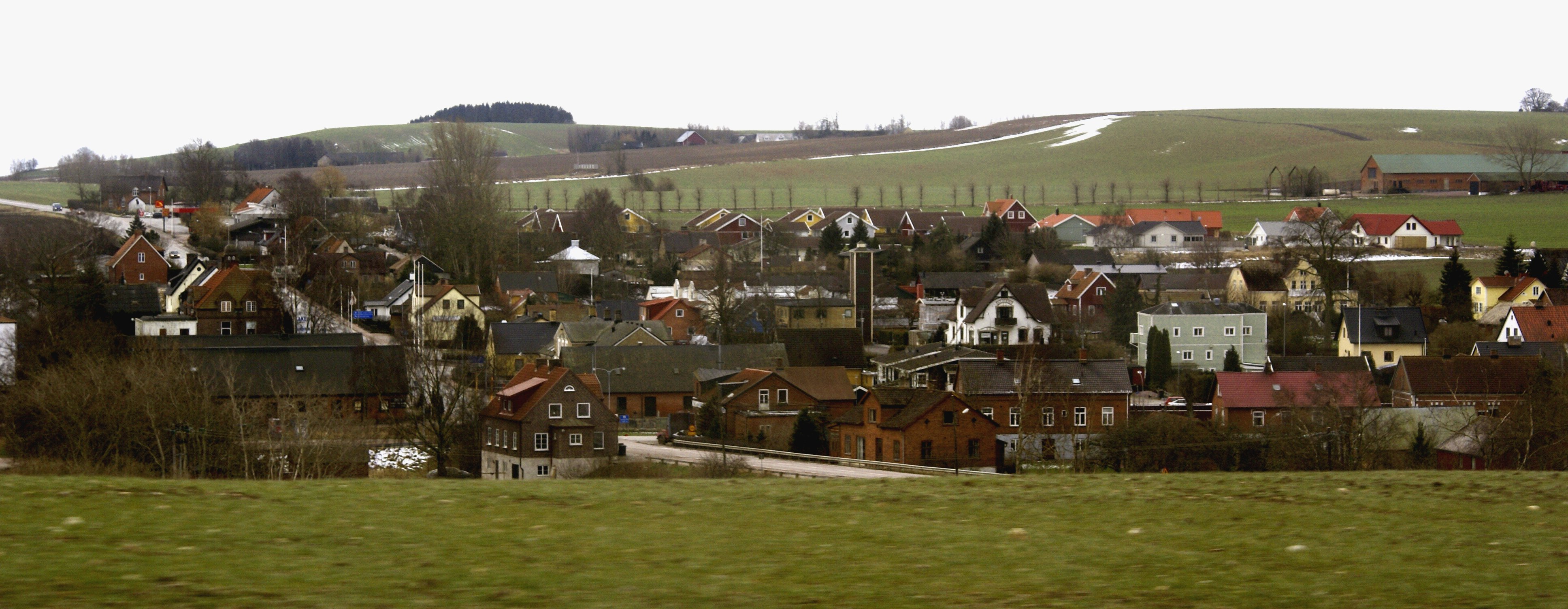 Tågarp, Skåne, Sweden